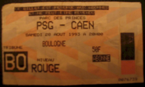 Pas de copyright sur les tickets de match, surtout en l'absence de logo (s). Match PSG-Caen du 28 août 1993. Ce cliché est destiné à illustrer un paragraphe de l'article consacré aux supporters du PSG concernant les incidents qui eurent lieu au cours de ce match, et dans cette tribune.